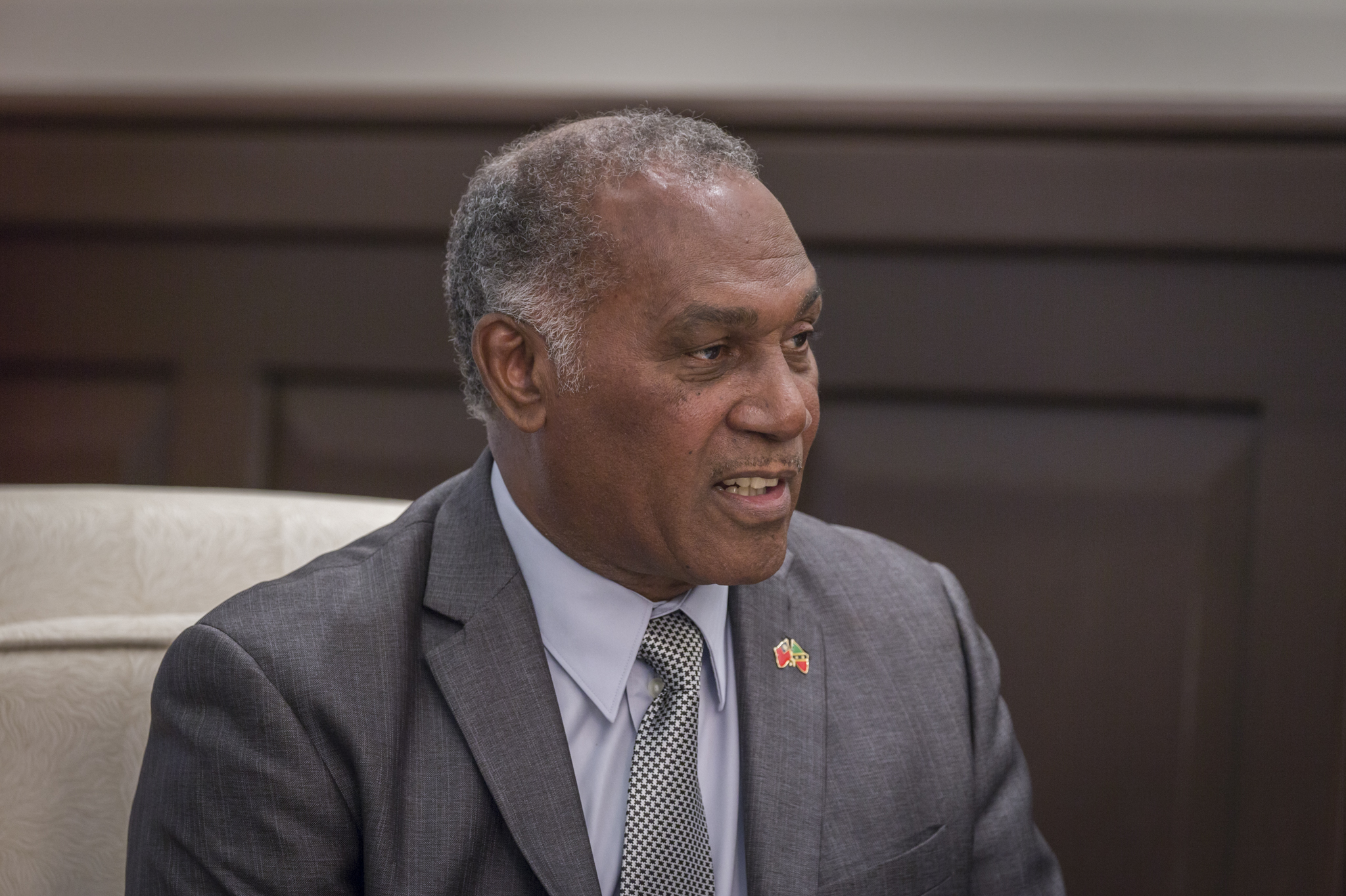 中文（台灣）: 聖克里斯多福及尼維斯資深部長暨尼維斯事務、勞工、社會安全及宗教事務部長艾默里。